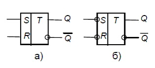 Умовні позначеня RS-тригера